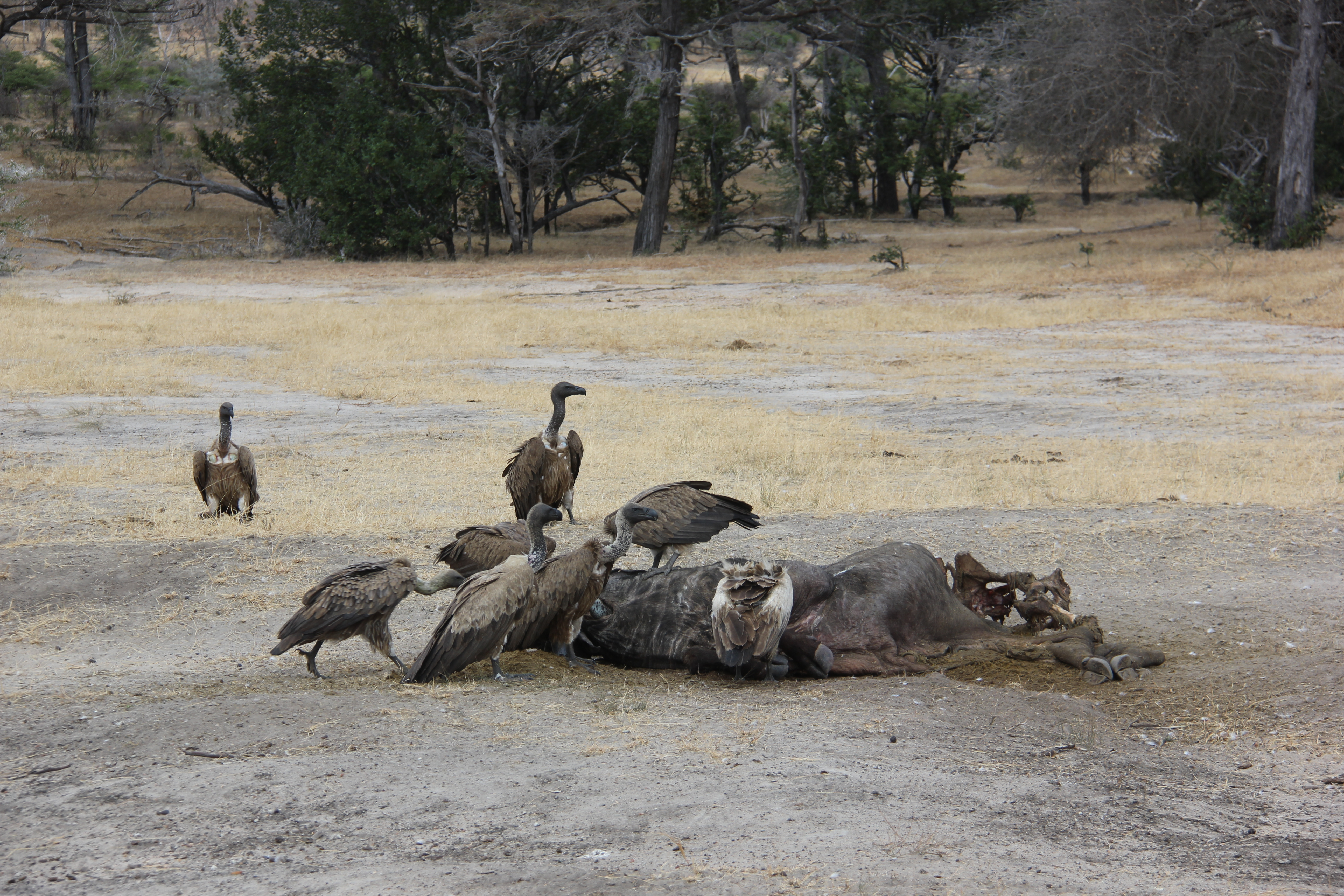 Selous